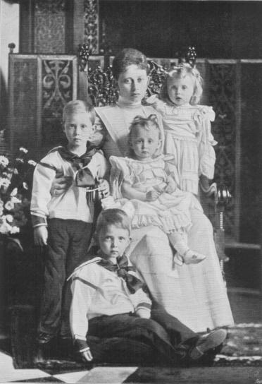 Fotografia rodziny ks. Fryderyka von Hessen-Kassel, r. 1899